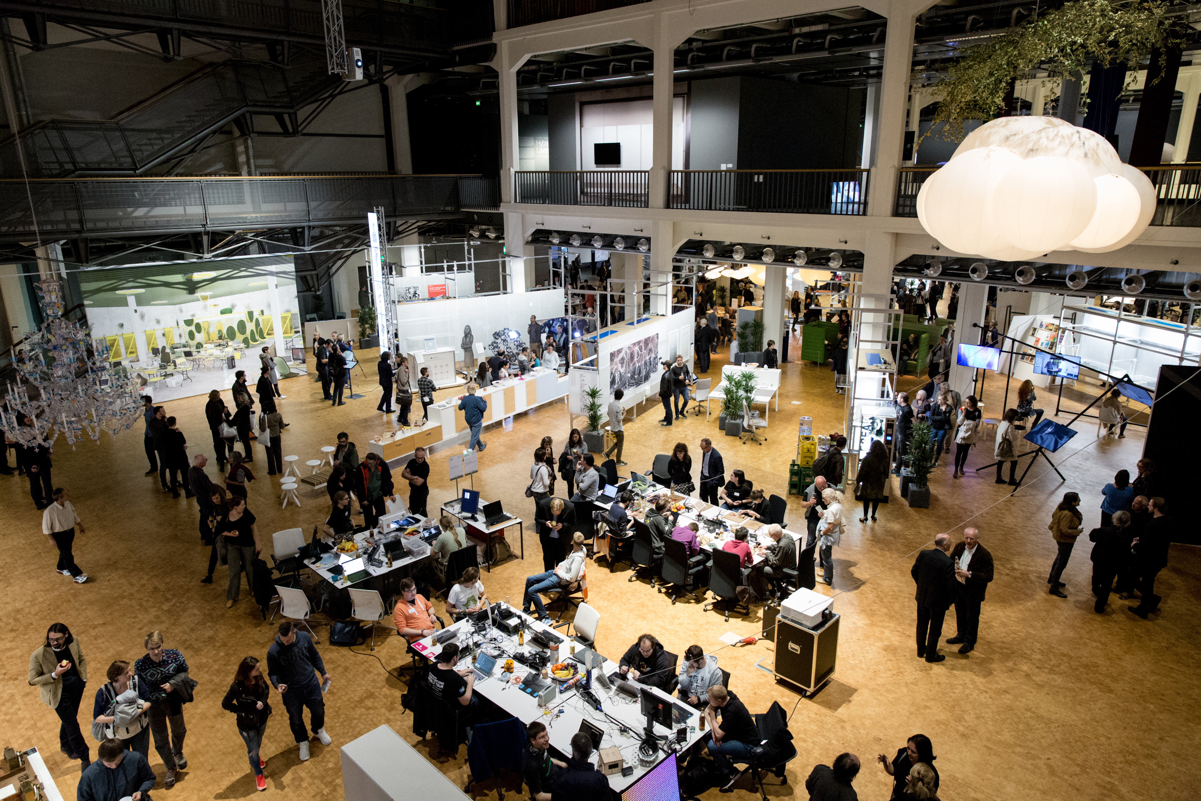 Zentrum für Kunst und Medien Karlsruhe